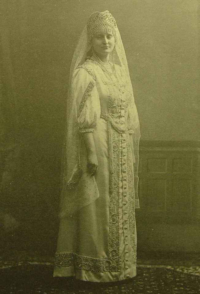 Гендрикова, Анастасия Васильевна, фрейлина императрицы, убитая вскоре после царской семьи. 1913 год, фотография в боярском наряде